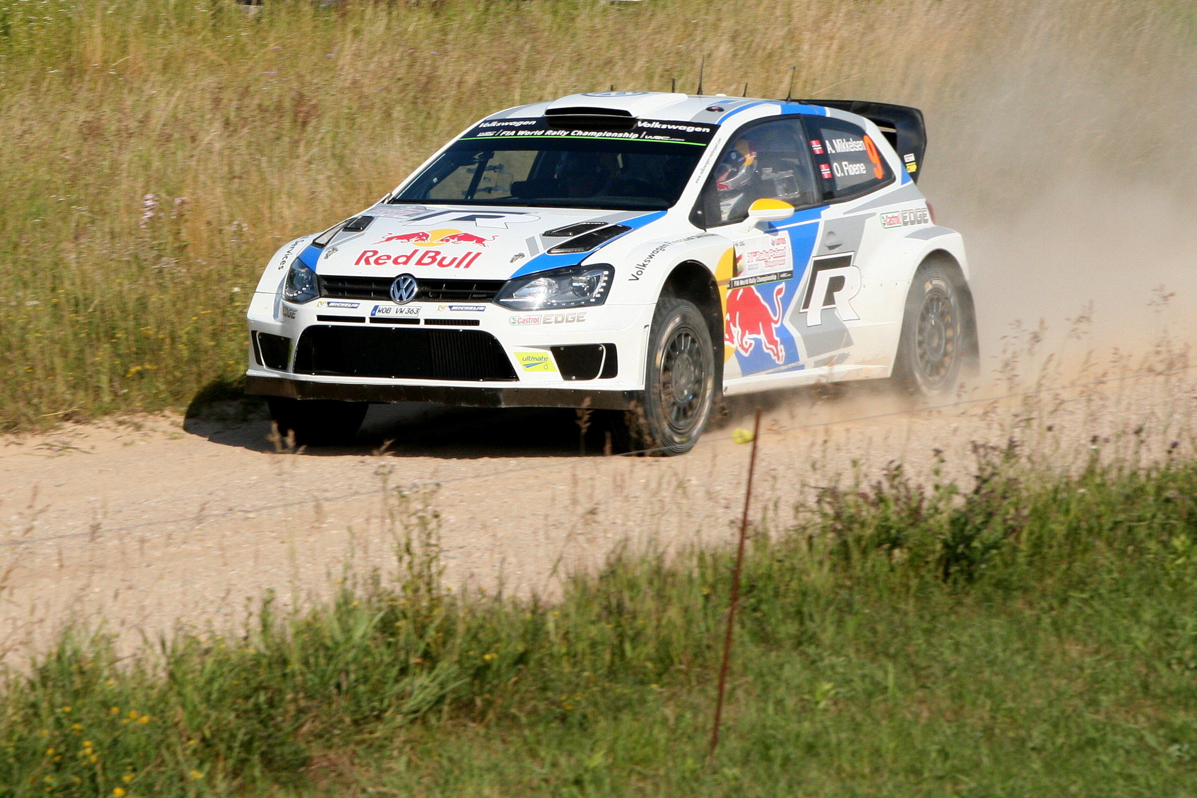 Andreas Mikkelsen podczas Rajdu Polski 2014, 11 OS Chmielówka 1